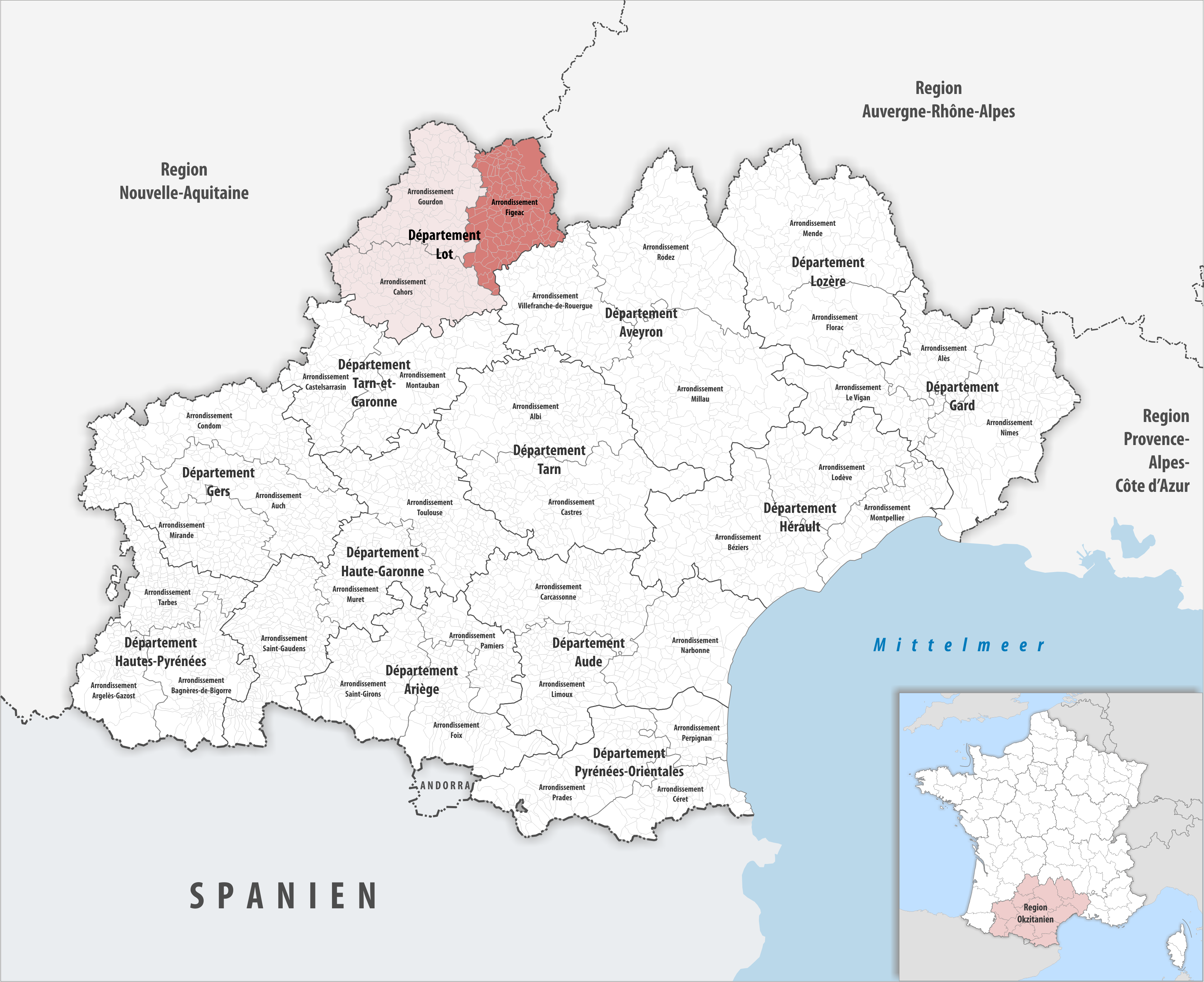 Lage des Arrondissements Figeac